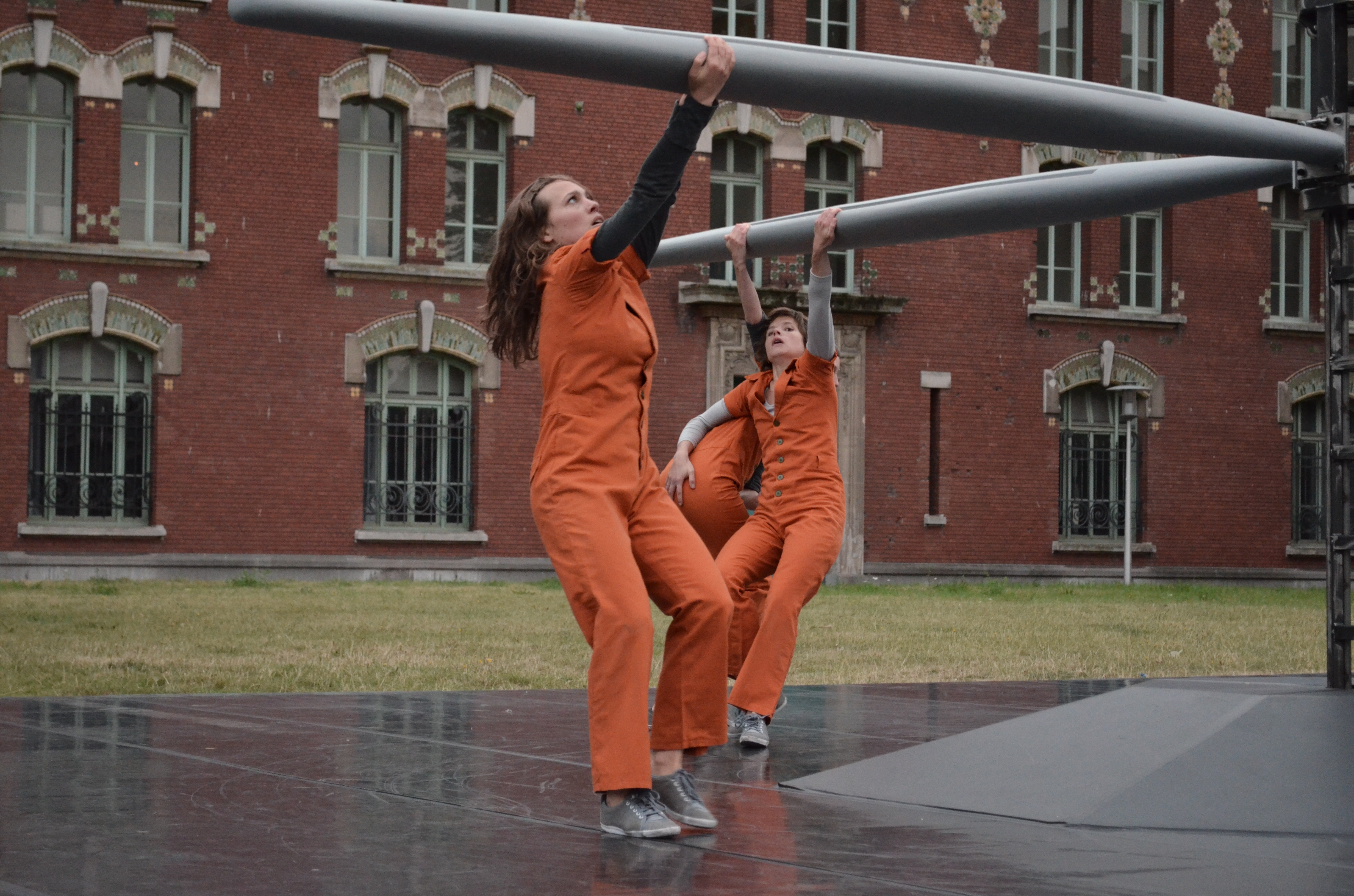 Voleuse / / A.I.M.E. @ Rafales d'art, Le Bateau Feu ; Dunkerque, 21 septembre 2012. Conception : Julie Nioche & Virginie Mira Chorégraphie : Julie Nioche Scénographie : Virginie Mira Crée et dansé par : Margot Dorléans, Ariane Guitton, Bérénice Legrand, Julie Nioche Création lumière : Gilles Gentner Création musique : Alexandre Meyer Régie Générale : Olivier Mendili Costumes : Anna Rizza Remerciements : Atelier Devineau, Christian Le Moulinier Production A.I.M.E.